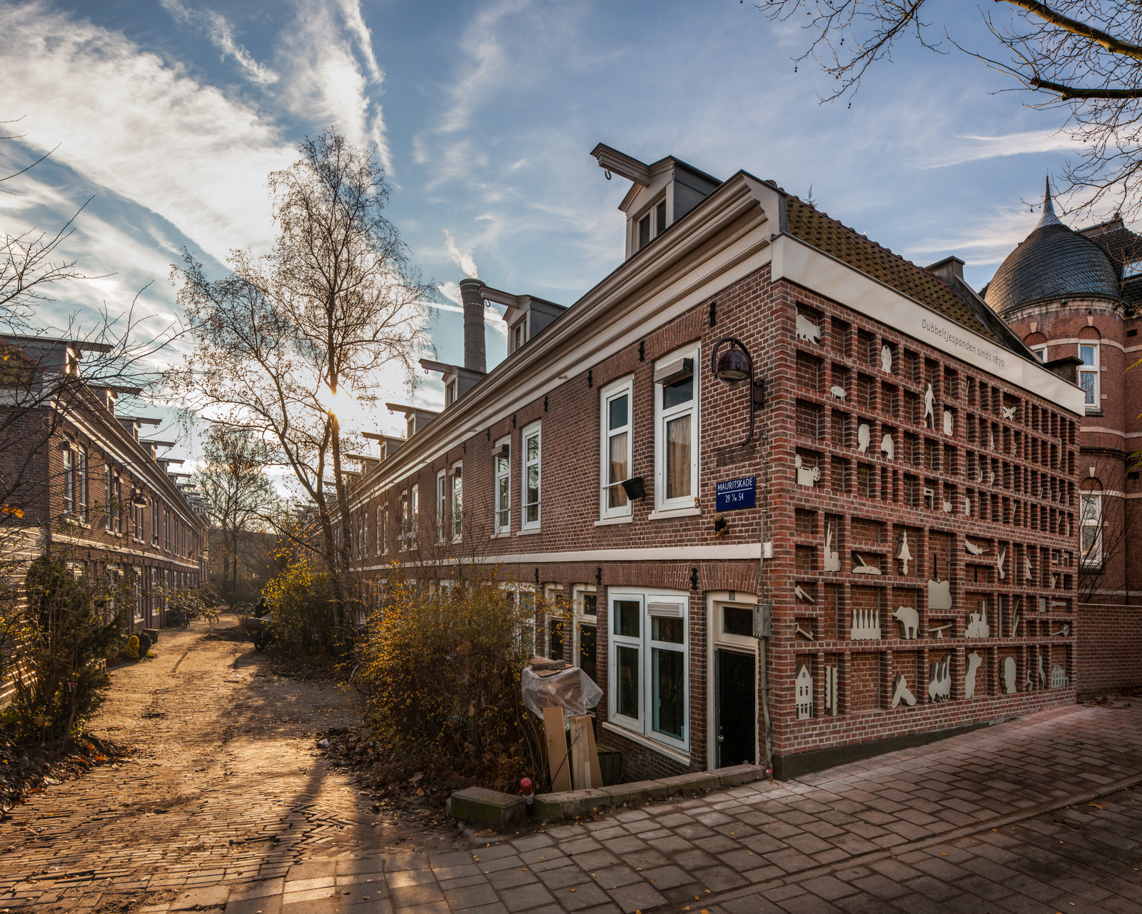 De Dubbeltjespanden aan de Mauritskade, december 2013; links de huizen, rechts het kunstwerk van Marjet Wessels Boer